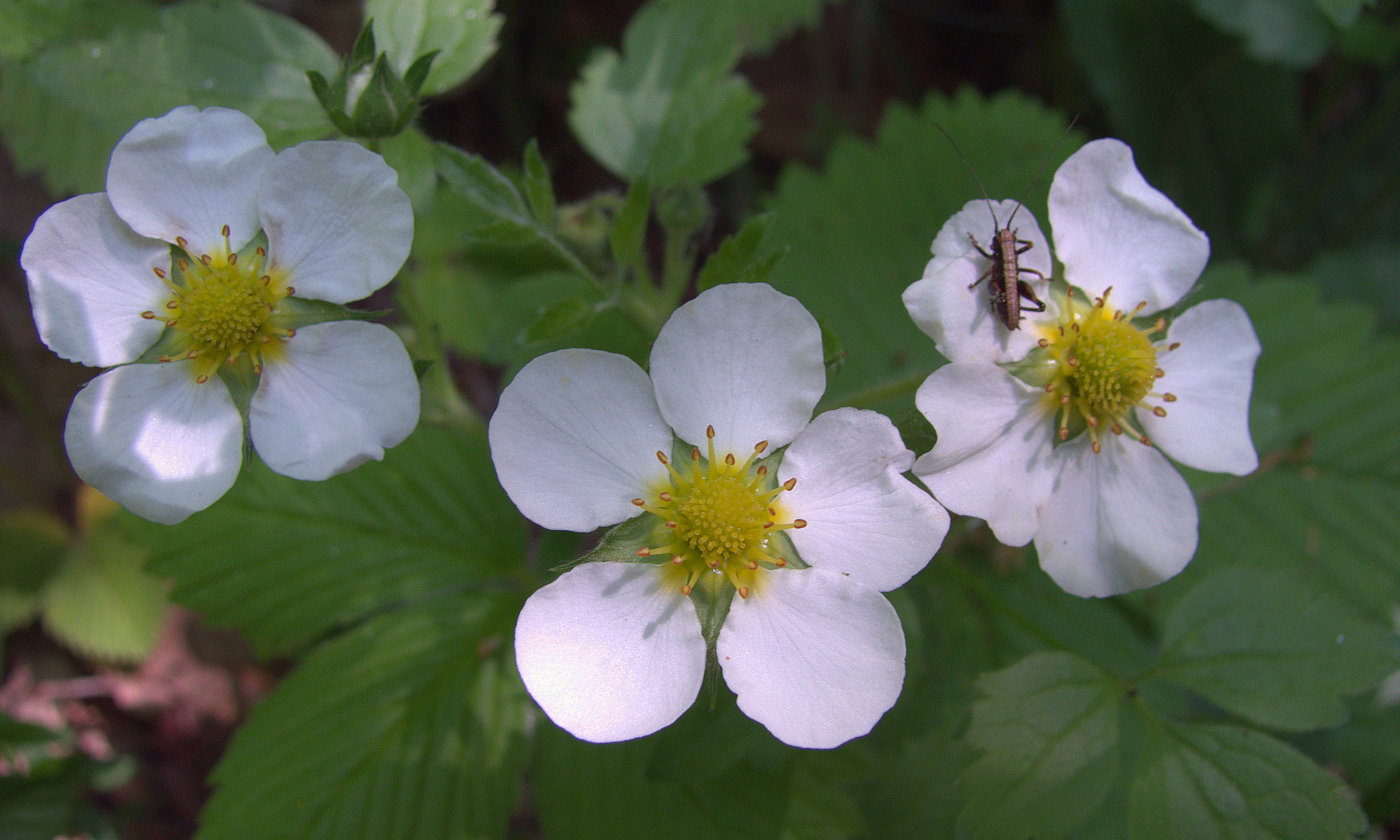 Muškatni jagodnik